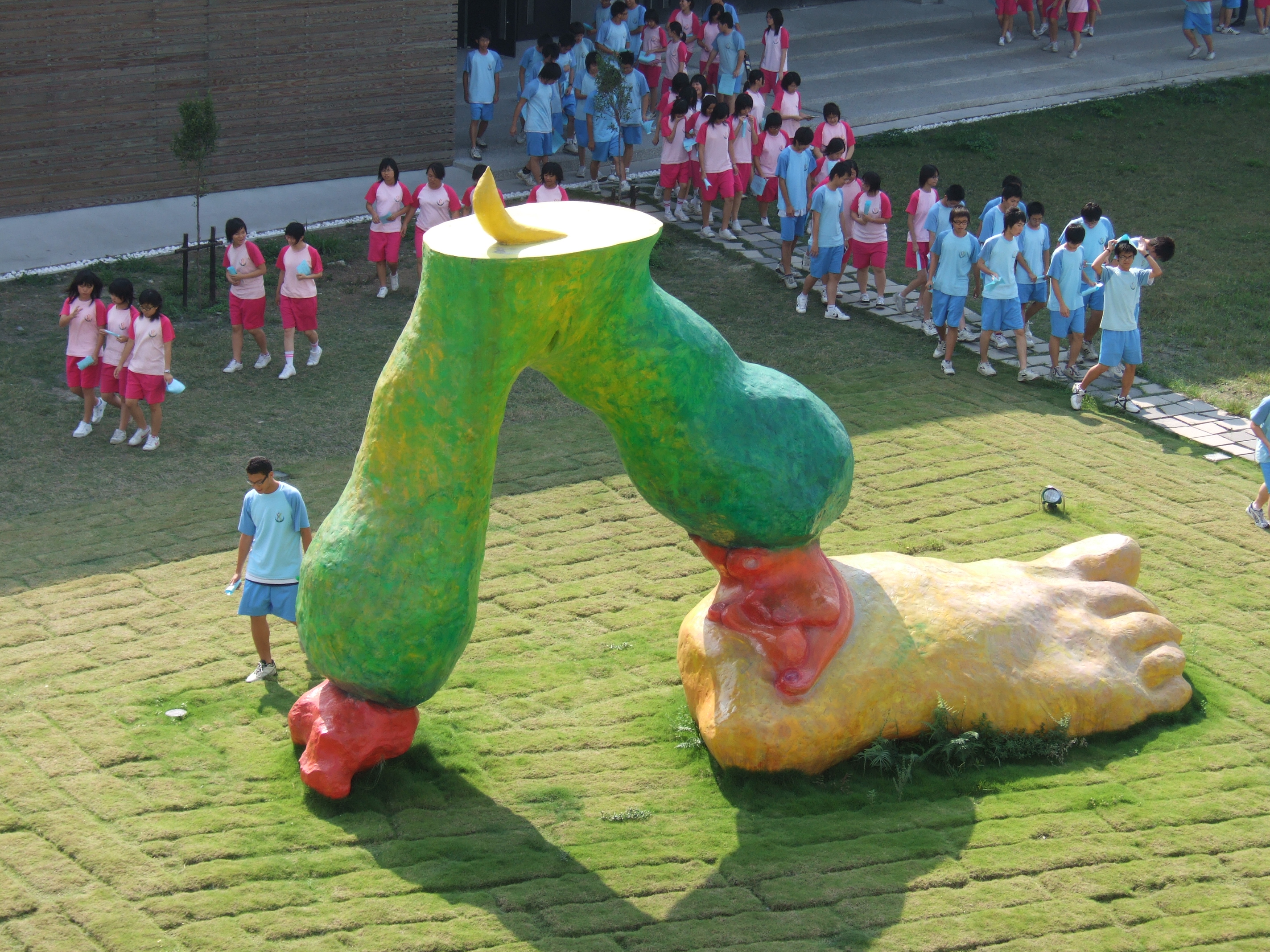 國立屏北高級中學公共藝術 NATIONAL PINGBEI SENIOR HIGH SCHOOL ART PUBLIC~ Taiwan / Pingtung 傅慶豊 ALIXE FU "巨足"F.R.P、Lasceaux Acrylic、LED , 450x 300x700 cm. 2005年